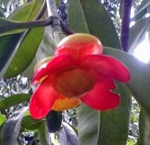 Bunga asam gelugur betina